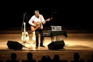 Tommy_emmanuel_01.jpg